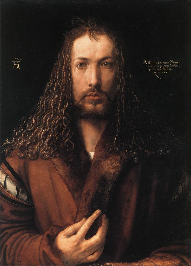 Frontalporträt mit Idealisierung vergleichbar mit Christusdarstellungen; betonter Blick und die schöpferische Hand als Werkzeuge des Künstlers